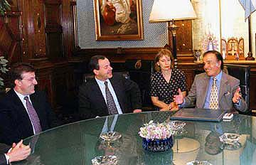 El presidente Menem se reunió con el presidente ejecutivo del Grupo Suiza de Reaseguros, Dr. Lukas Mühlemann, quien destacó las transformaciones económicas realizadas en la Argentina y se mostró conforme por las señales económicas que muestran al país en la senda del crecimiento, algo que la comunidad económica internacional valora mucho.